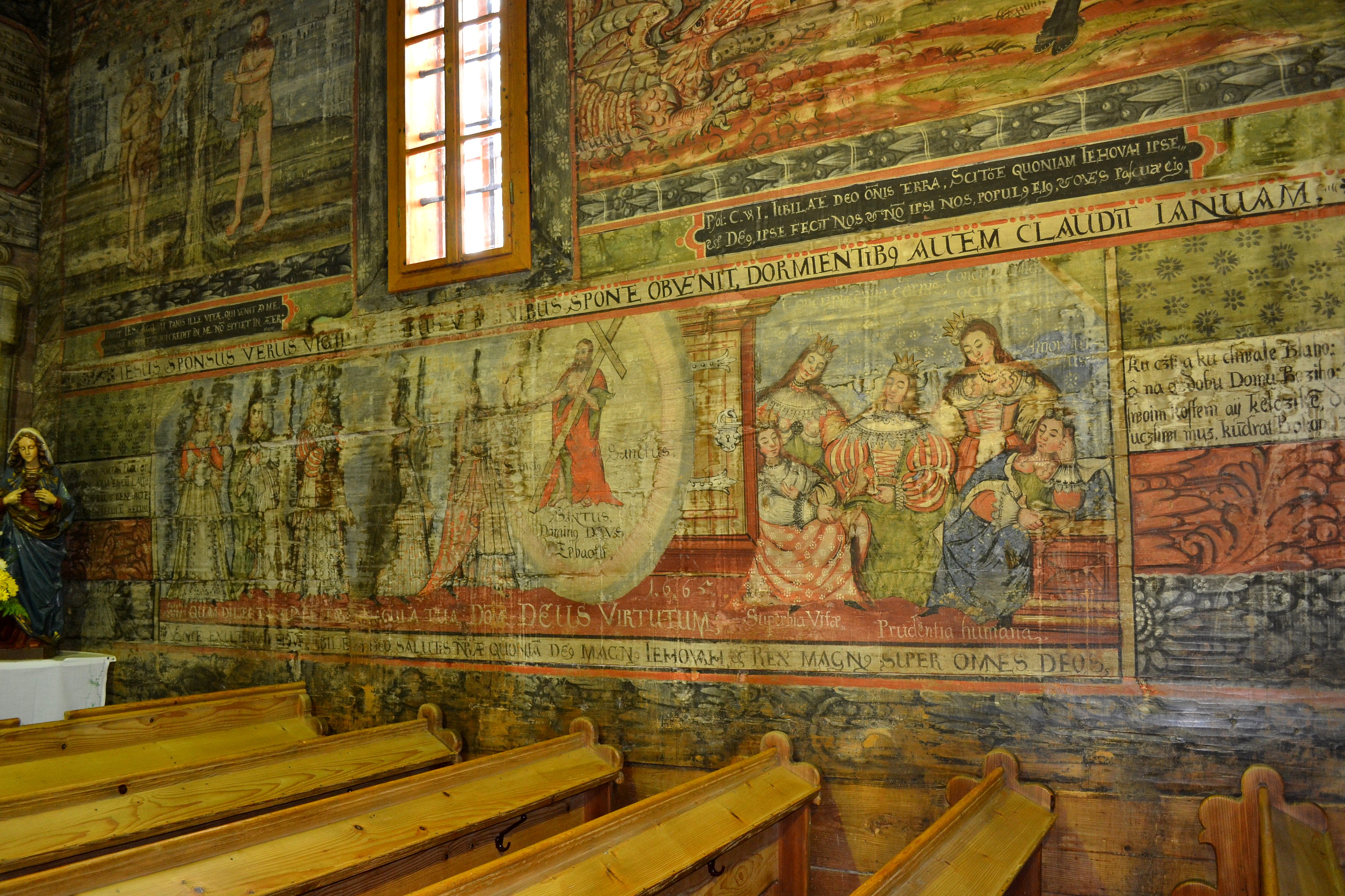 Výmaľba pravej steny lode